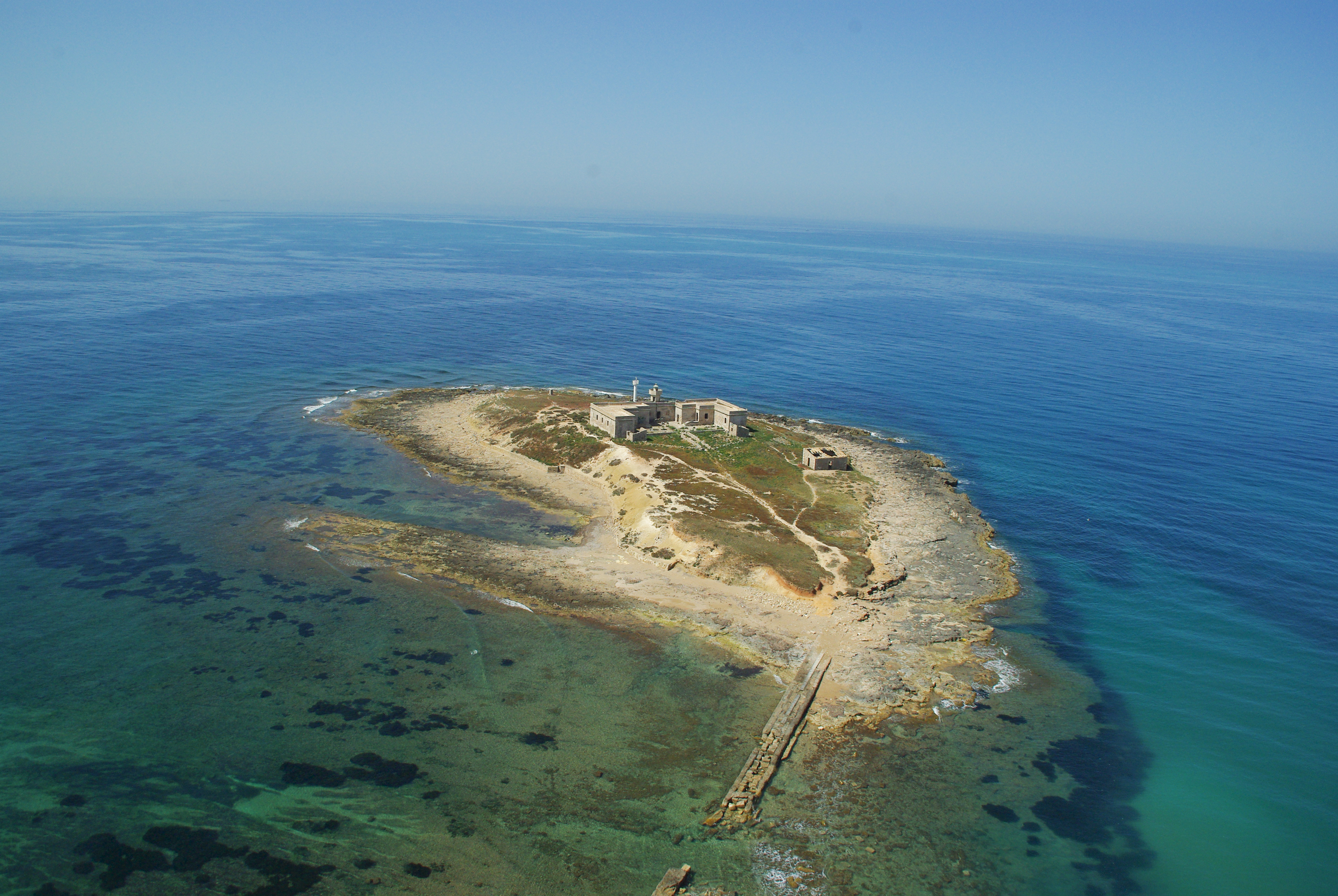 Isola delle Correnti - Sicily